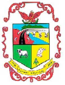 Escudo de Puente Nacional